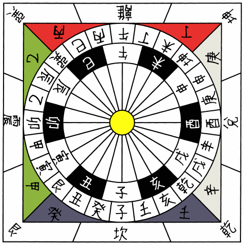 24 chinese cardinal directions